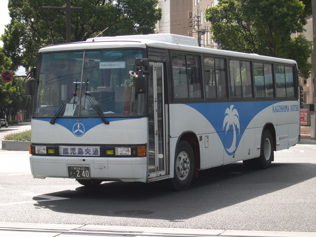 定期観光バス 2004-7-19 撮影